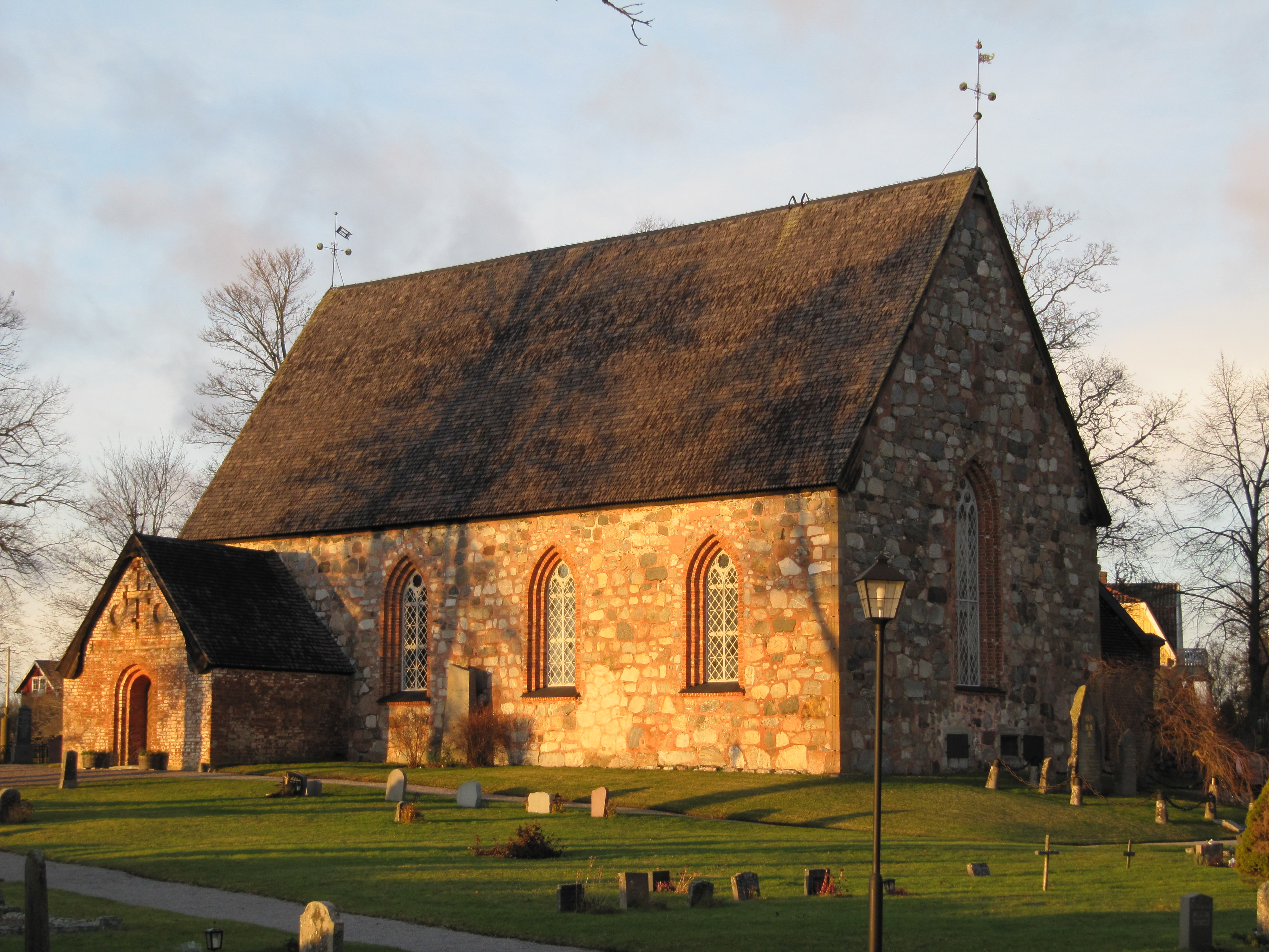 Håtuna kyrka